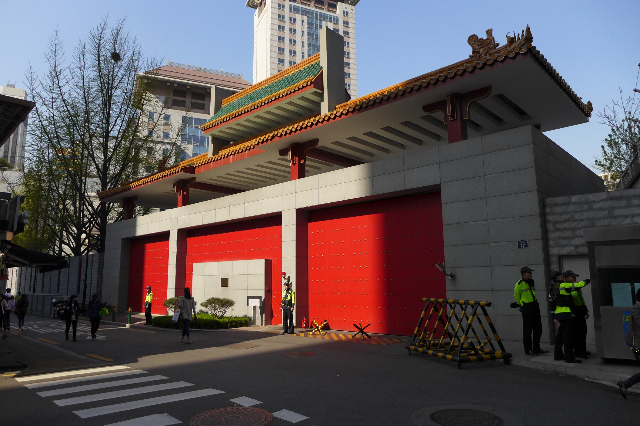 中國駐韓大使館